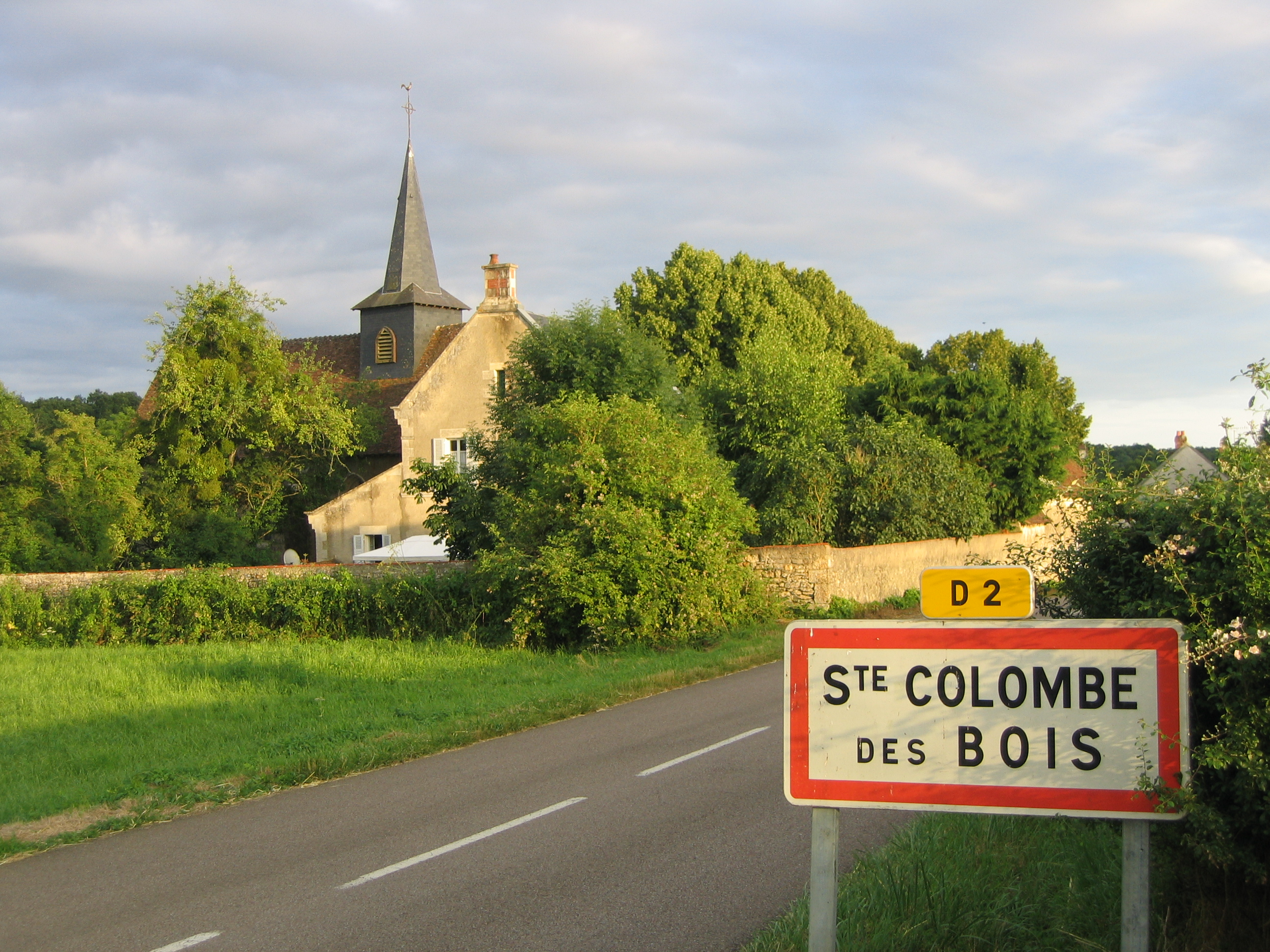 Vue du village